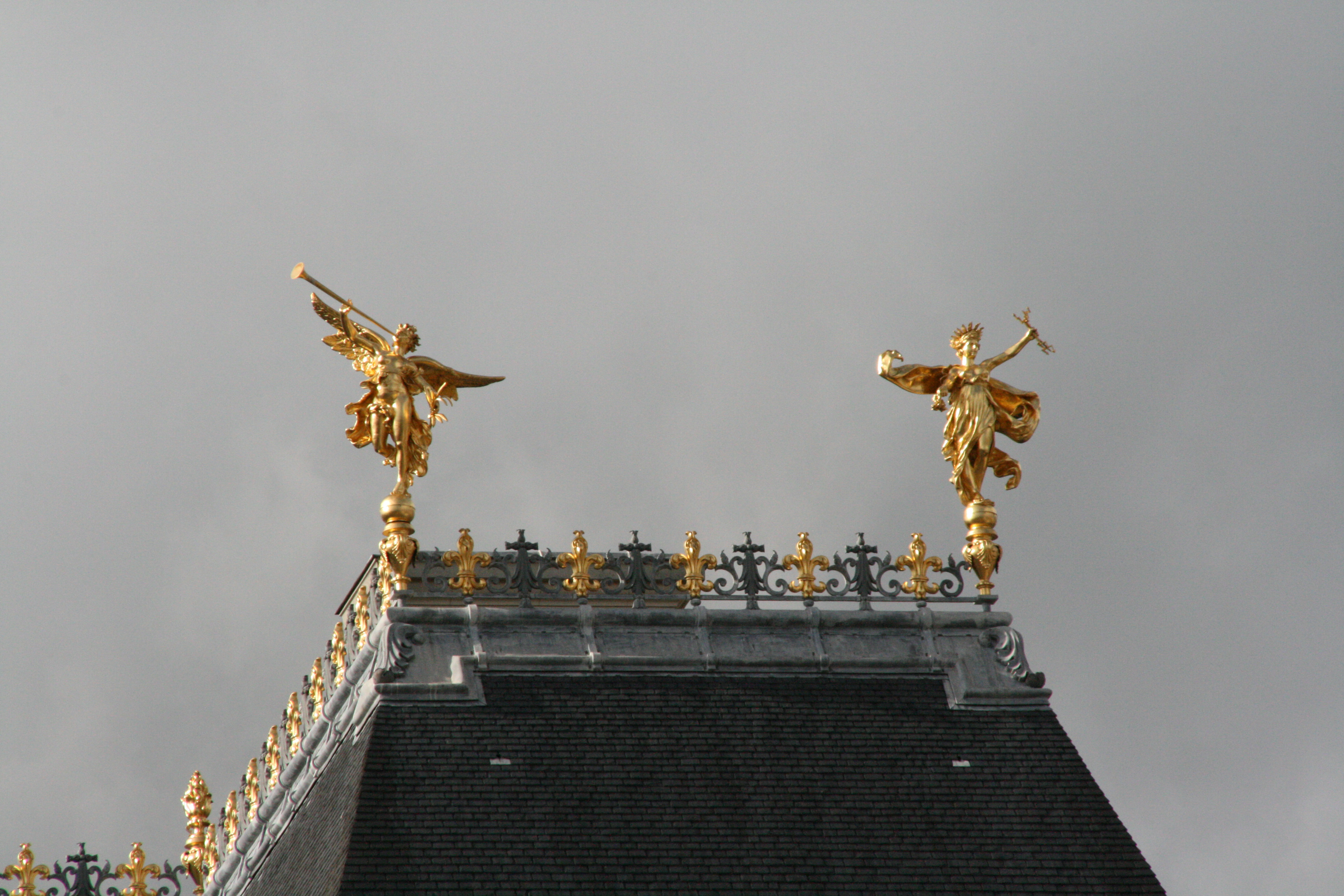 Faîtage. Statues en haut du toit côté ouest de la façade du Parlement de Bretagne, à Rennes (Ille-et-Vilaine, Bretagne), vues depuis la place du Parlement. De gauche à droite : L'Éloquence et La Justice..